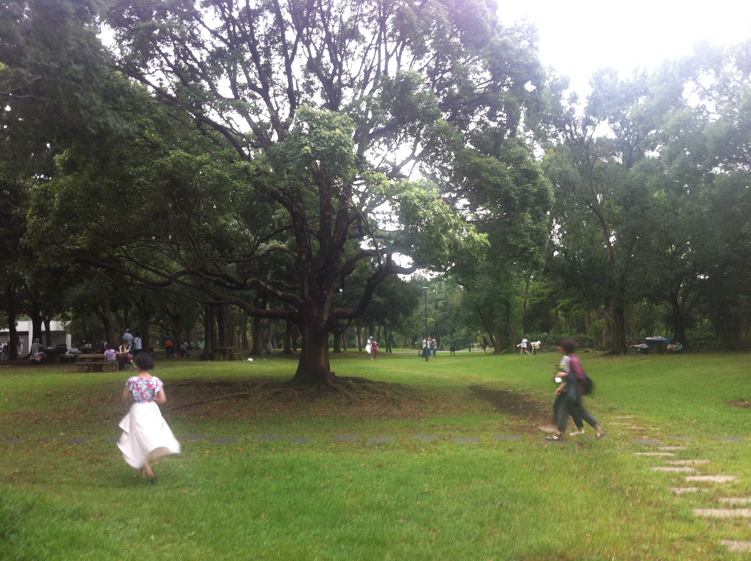 夢の島公園 Yumeshima park